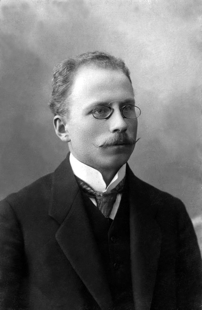 Яким Ярема – молодий професор Тернопільської гімназії. Фото 1913 р.